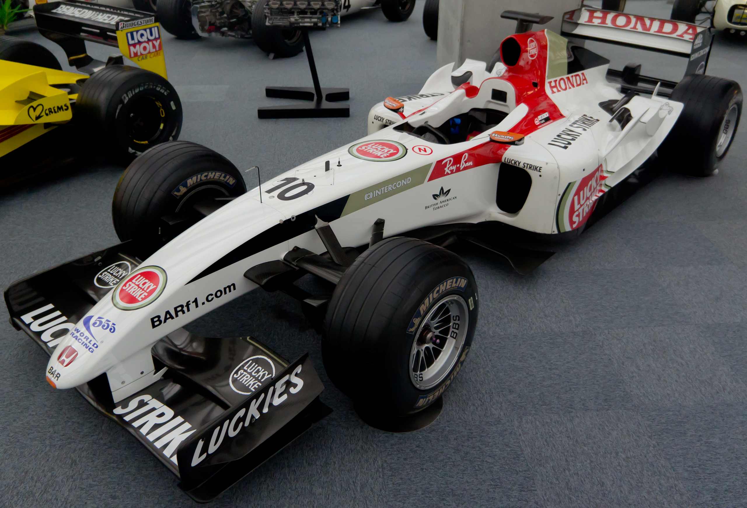 BAR 006 (#10 Takuma Sato)